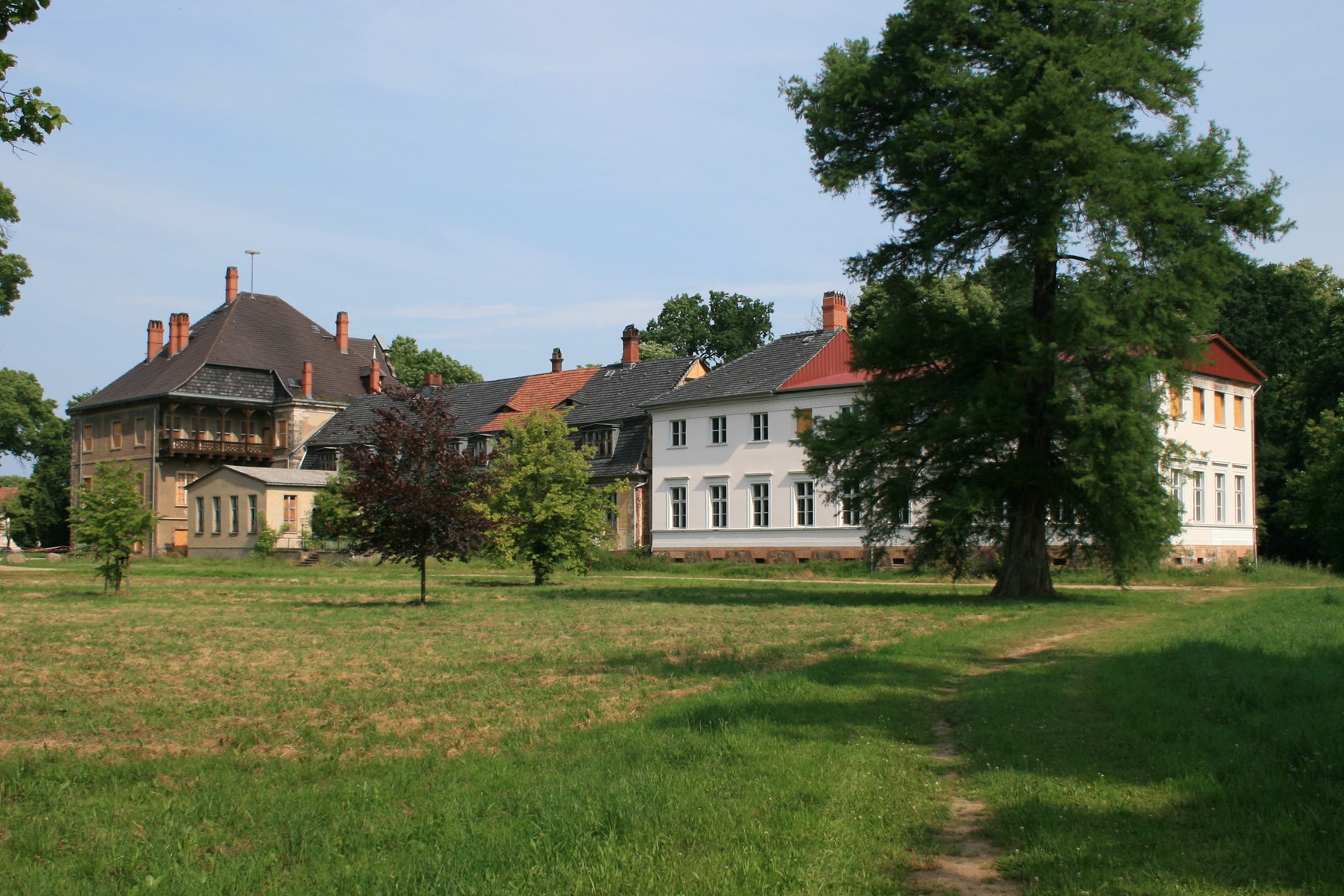 Neues Schloss in Baruth/Mark im Landkreis Teltow-Fläming.